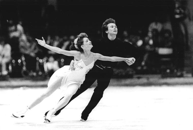 Marina Klimowa, Sergej Ponomarenko ADN-ZB Settnik 7.4.89 Berlin: ISU-Weltschaulaufen in der Werner-Seelenbinder-Halle (am 6.4.89)- Großen Beifall der 4000 Zuschauer erhielten die Weltmeister im Eistanz, Marina Klimowa-Sergej Ponomarenko (UdSSR), die den Abschluß der großen Gala bildeten.